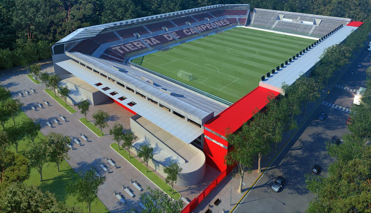 Nuevo Estadio Pincha Vista1